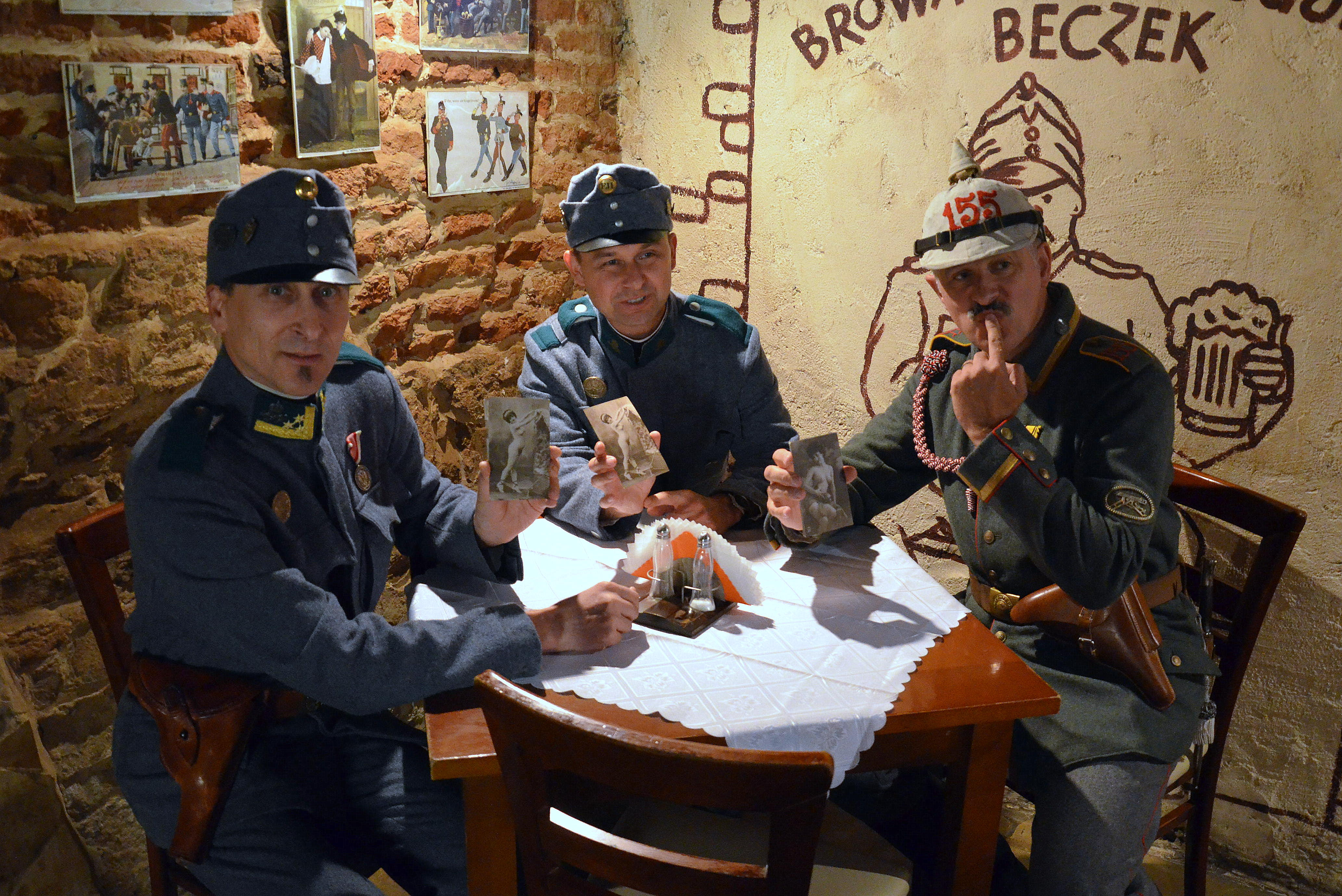 Galizische Küche. Rezepte aus Beskiden